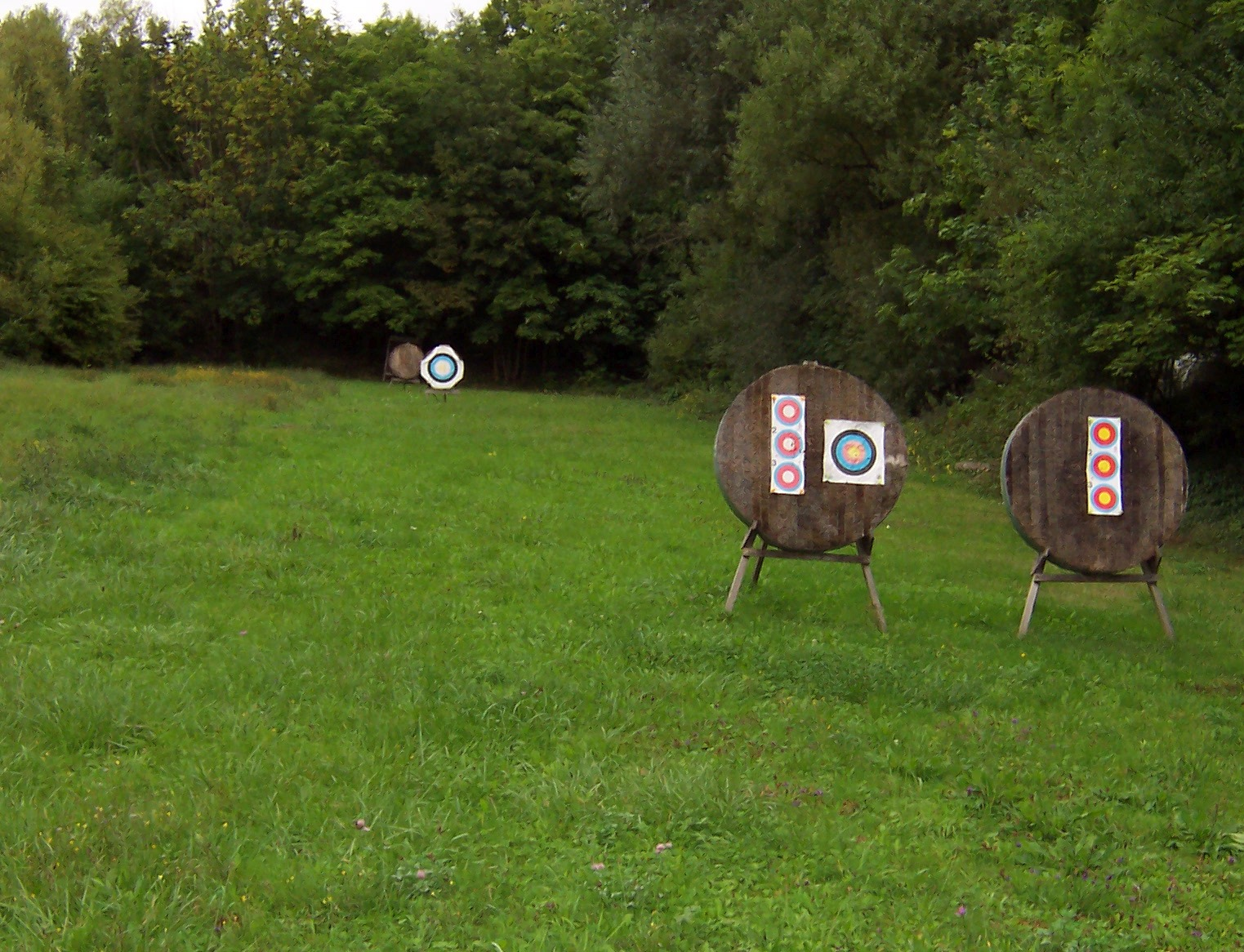 Bogenwiese